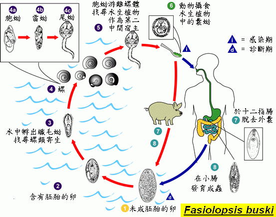 中文（台灣）: 布氏薑片蟲的生活史。美國疾病控制與預防中心原作，User:Droxiang改製成中文版。